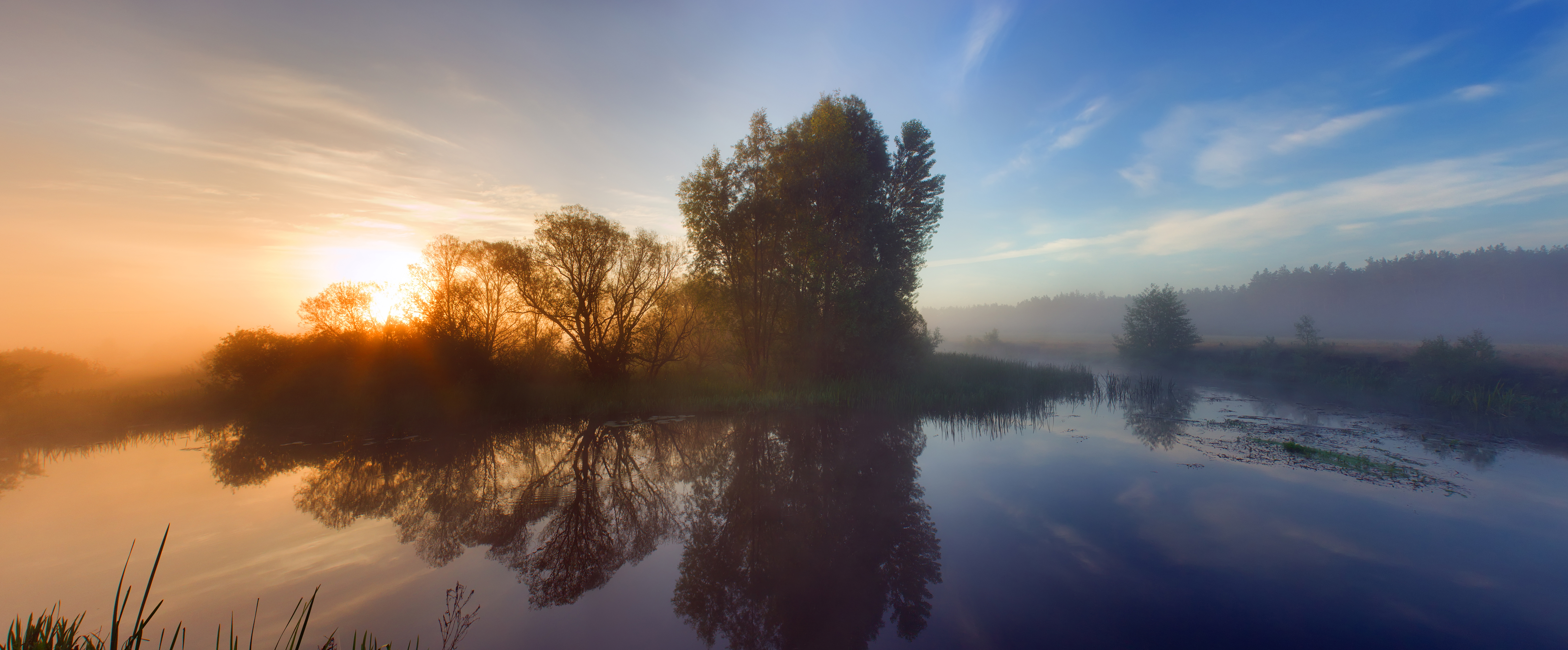 Река Волчья, Волчанский район, Харьковская область